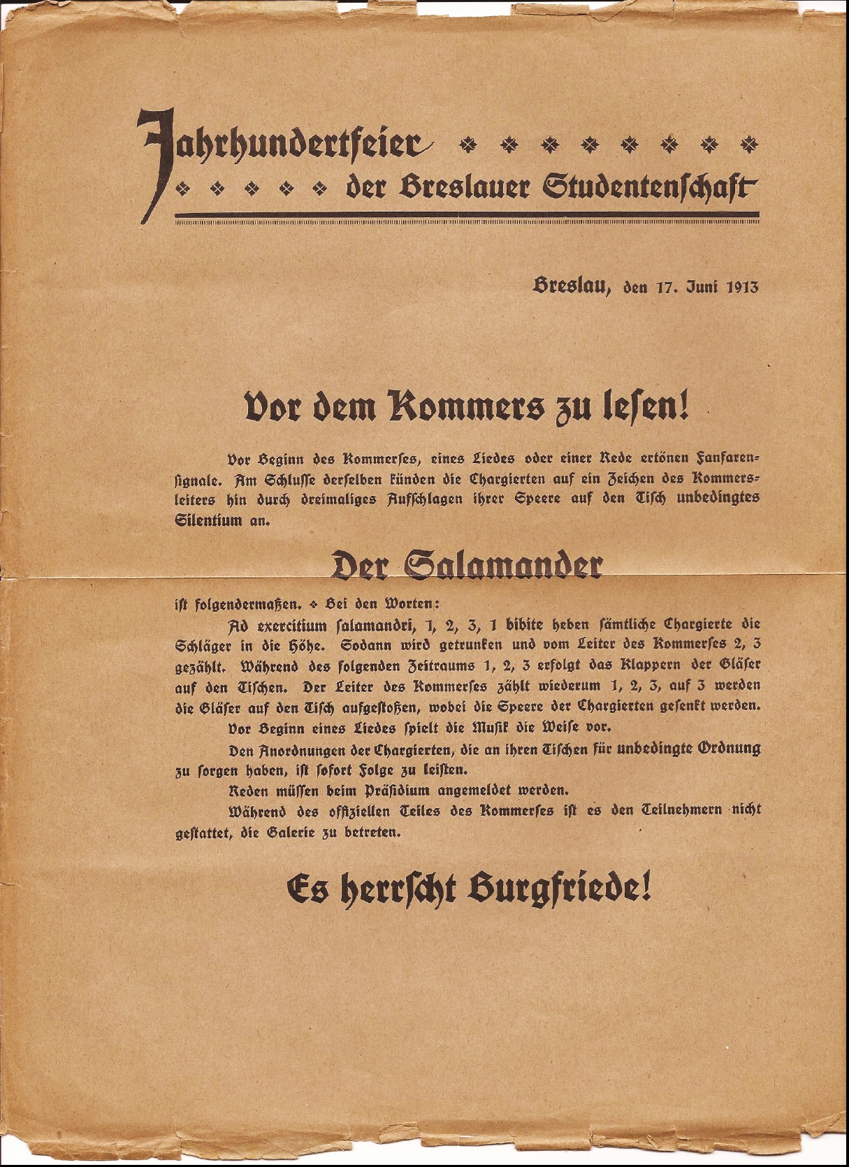 Einladung zum Kommers der Breslauer Studentenschaft bei der 100-Jahrfeier der Universität Breslau; Kommando zum Salamander (Ritual)